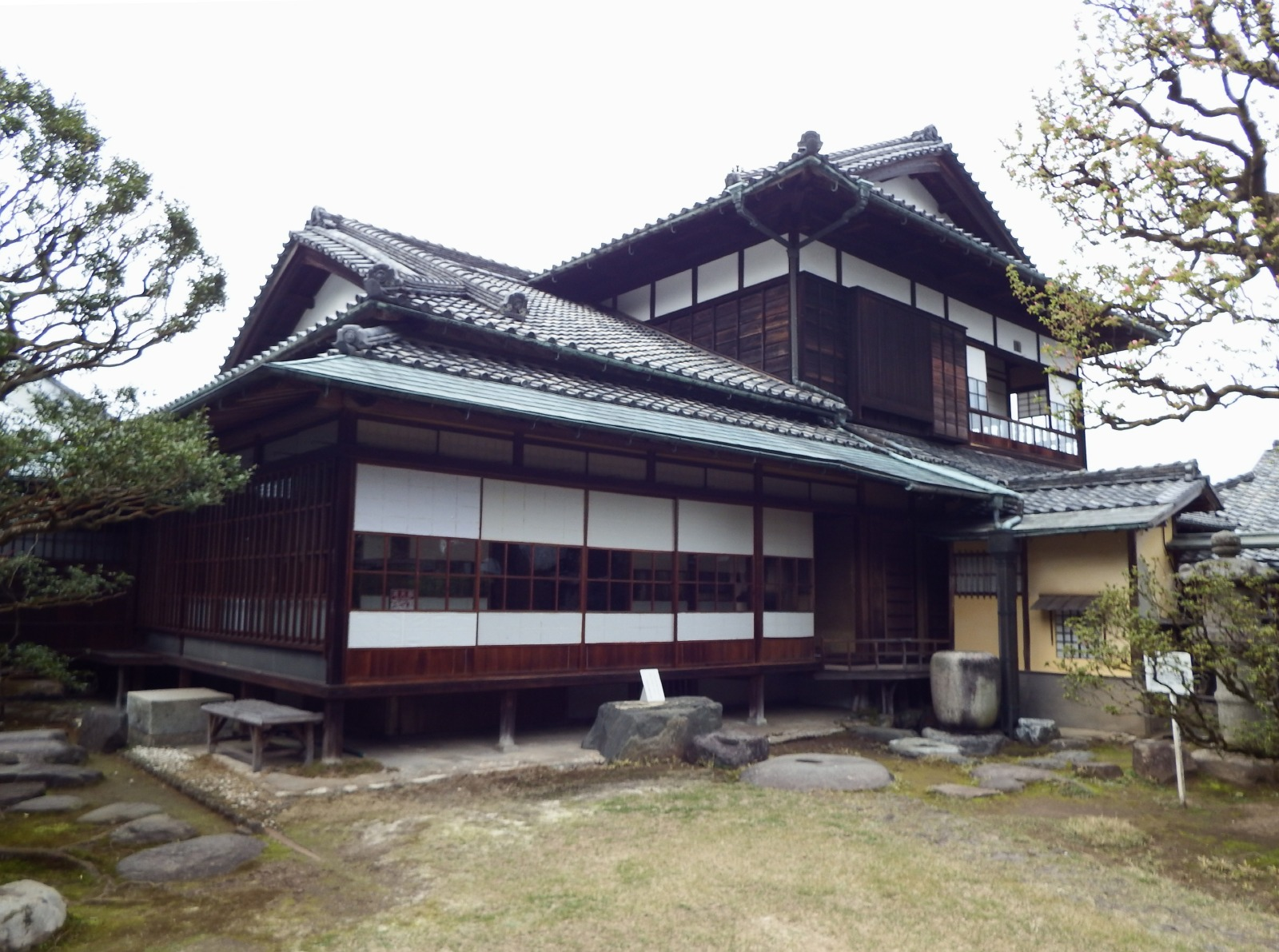 旧広瀬邸主屋